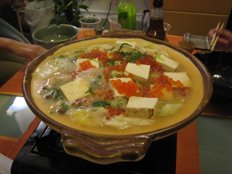 2005年12月作成。鮭とイクラ、焼豆腐、キャベツ、タマネギ、ジャガイモ、ニンジン、水菜そしてキノコ類を味噌＋酒仕立ての昆布出汁で煮ました。イクラは最後に入れ、食べる直前にバターをほんのちょっと入れます。最後はうどんで仕上げます。石狩鍋